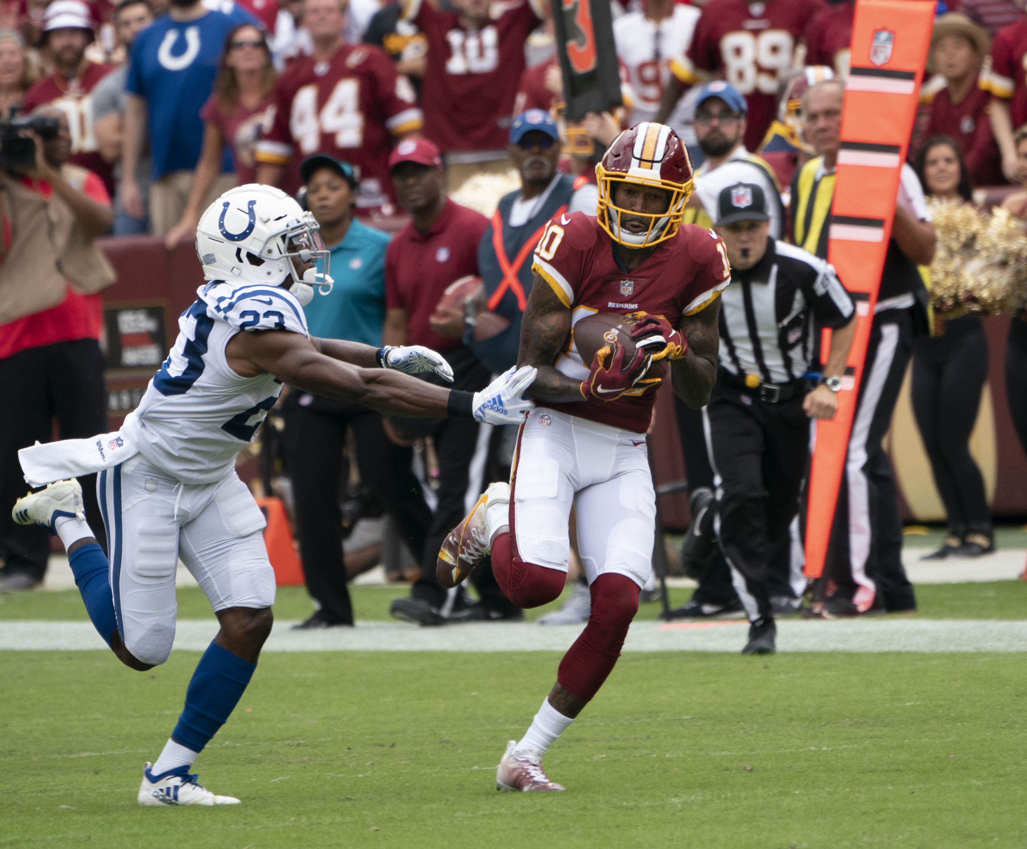 Colts at Redskins 09/16/18